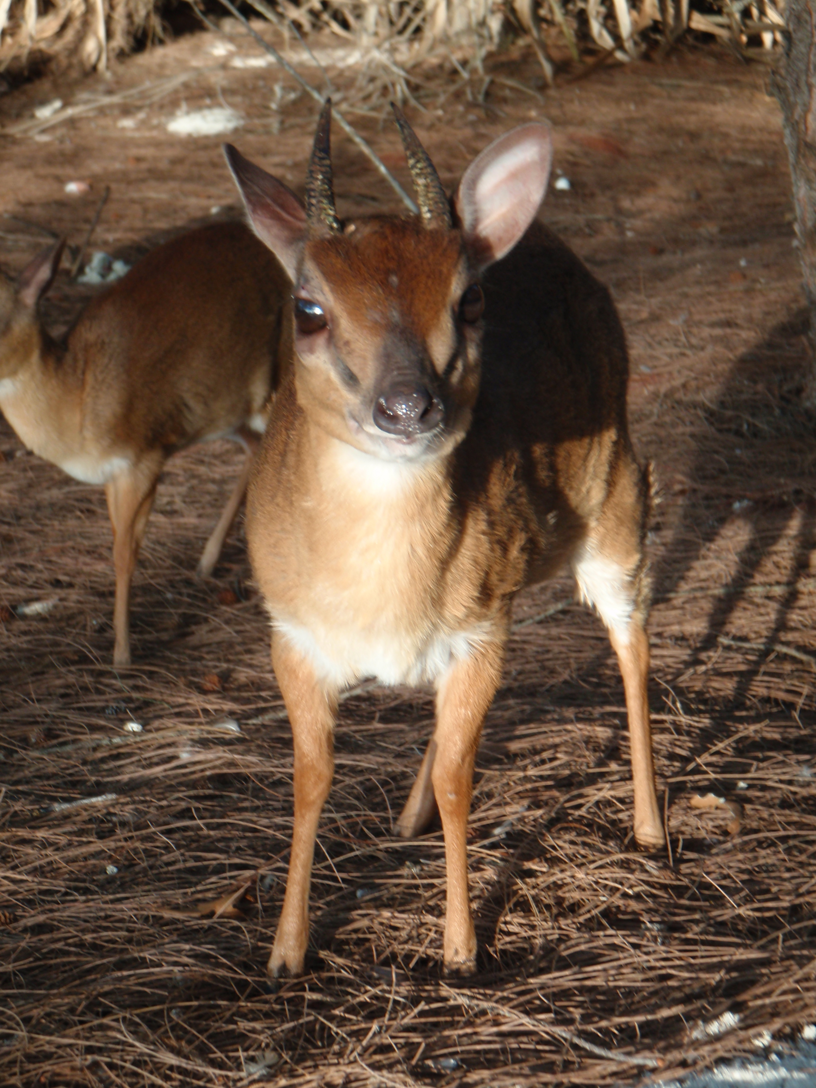 A Suni male in Mnemba, Zanzibar